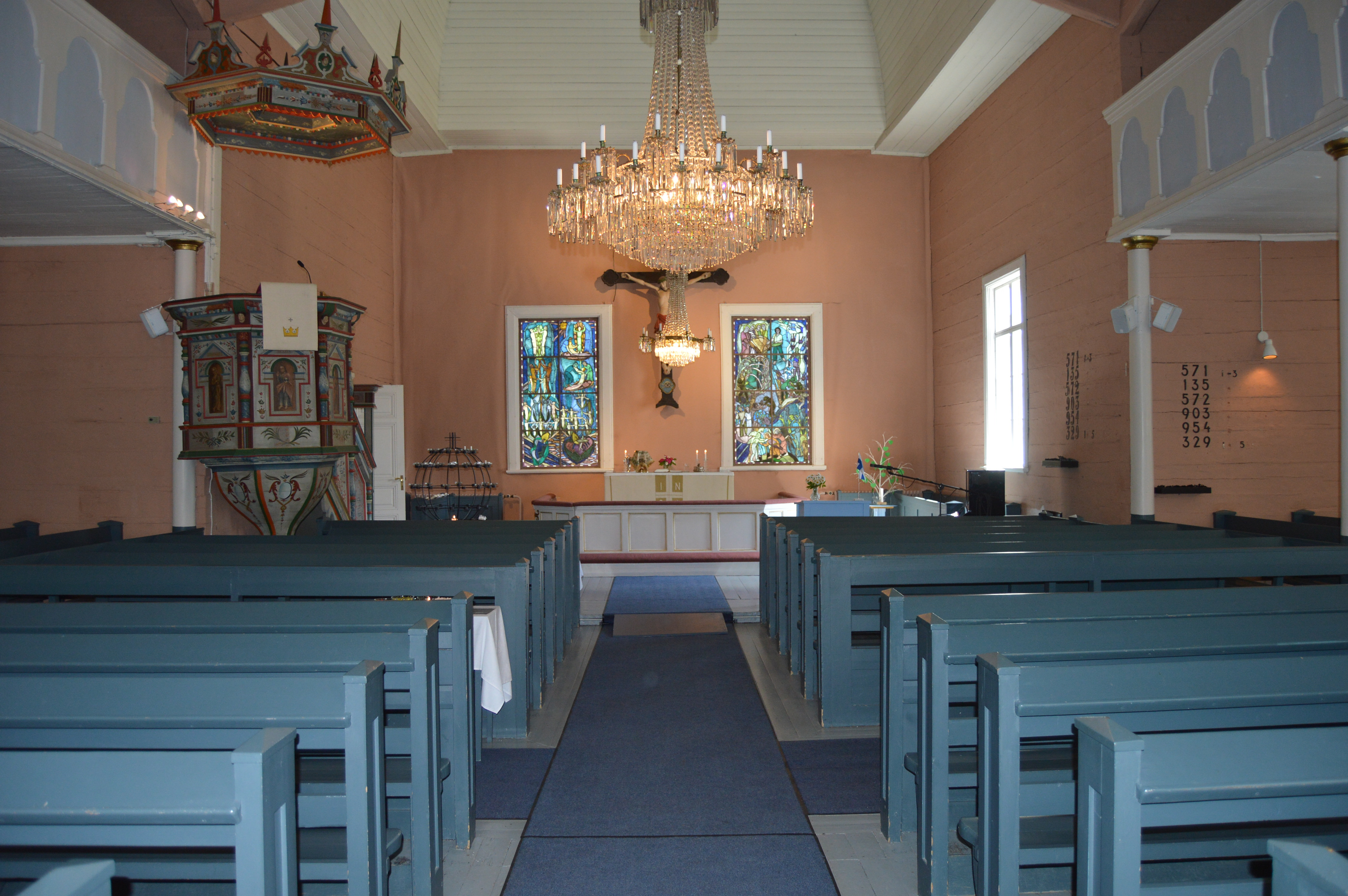 Lapinjärven kirkko sisältä juhannuspäivänä 22.6.2019